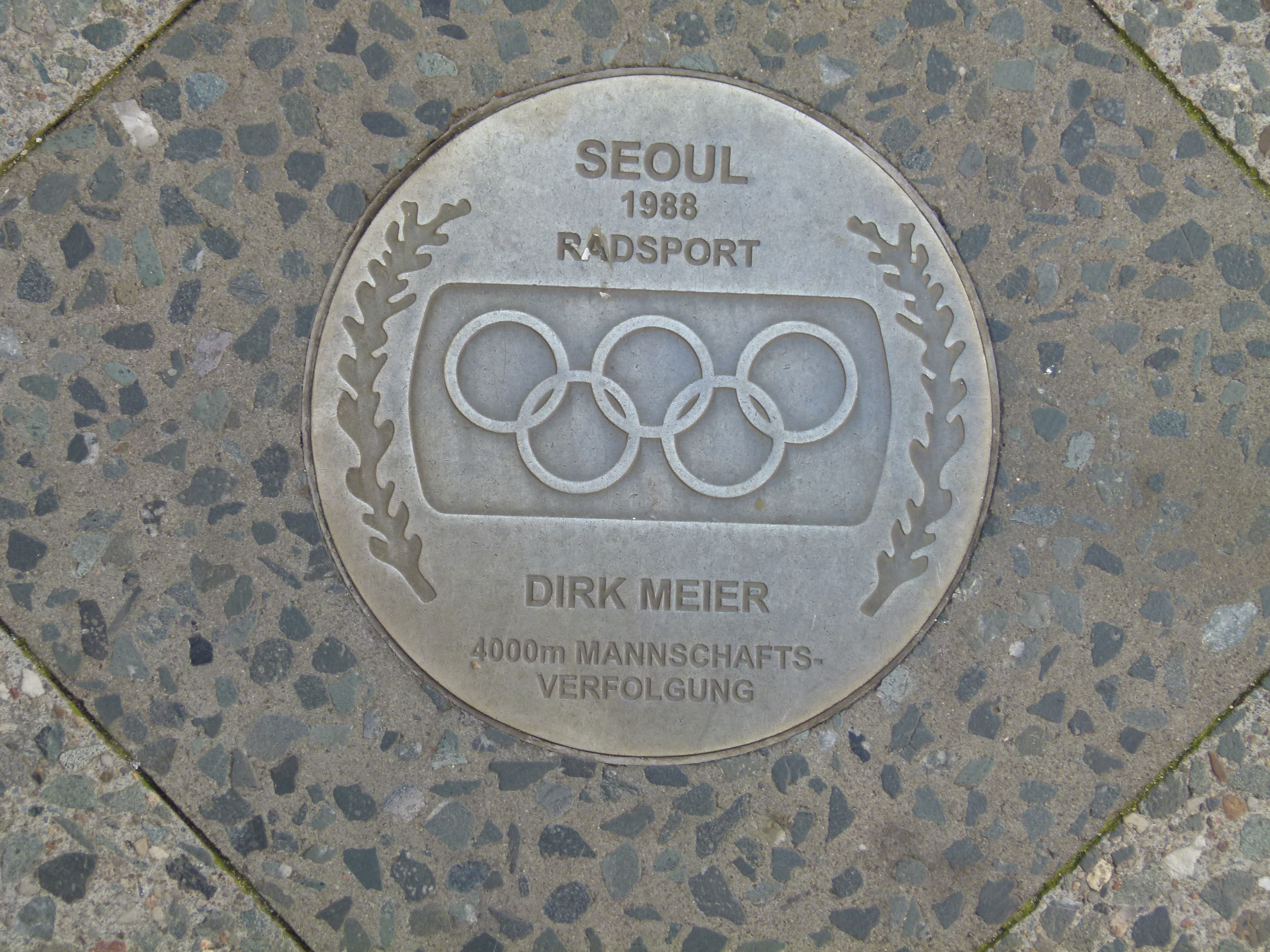 Dirk Meier, 4000m, Seoul, 1988